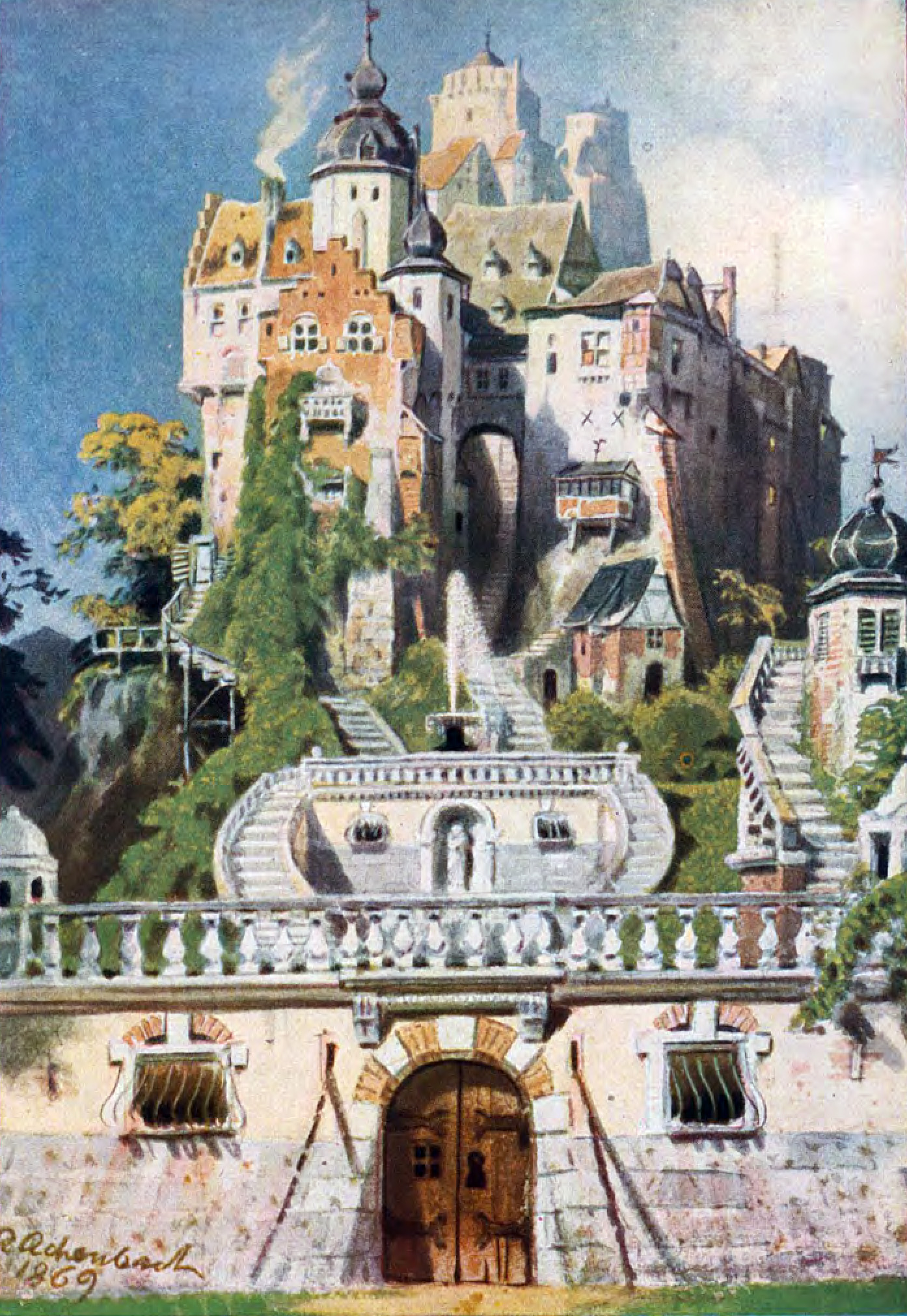 Andreas Achenbach Dekorationsentwurf Die Narrenburg zur Redoute des Künstlerverein Malkasten am 6. Februar 1869